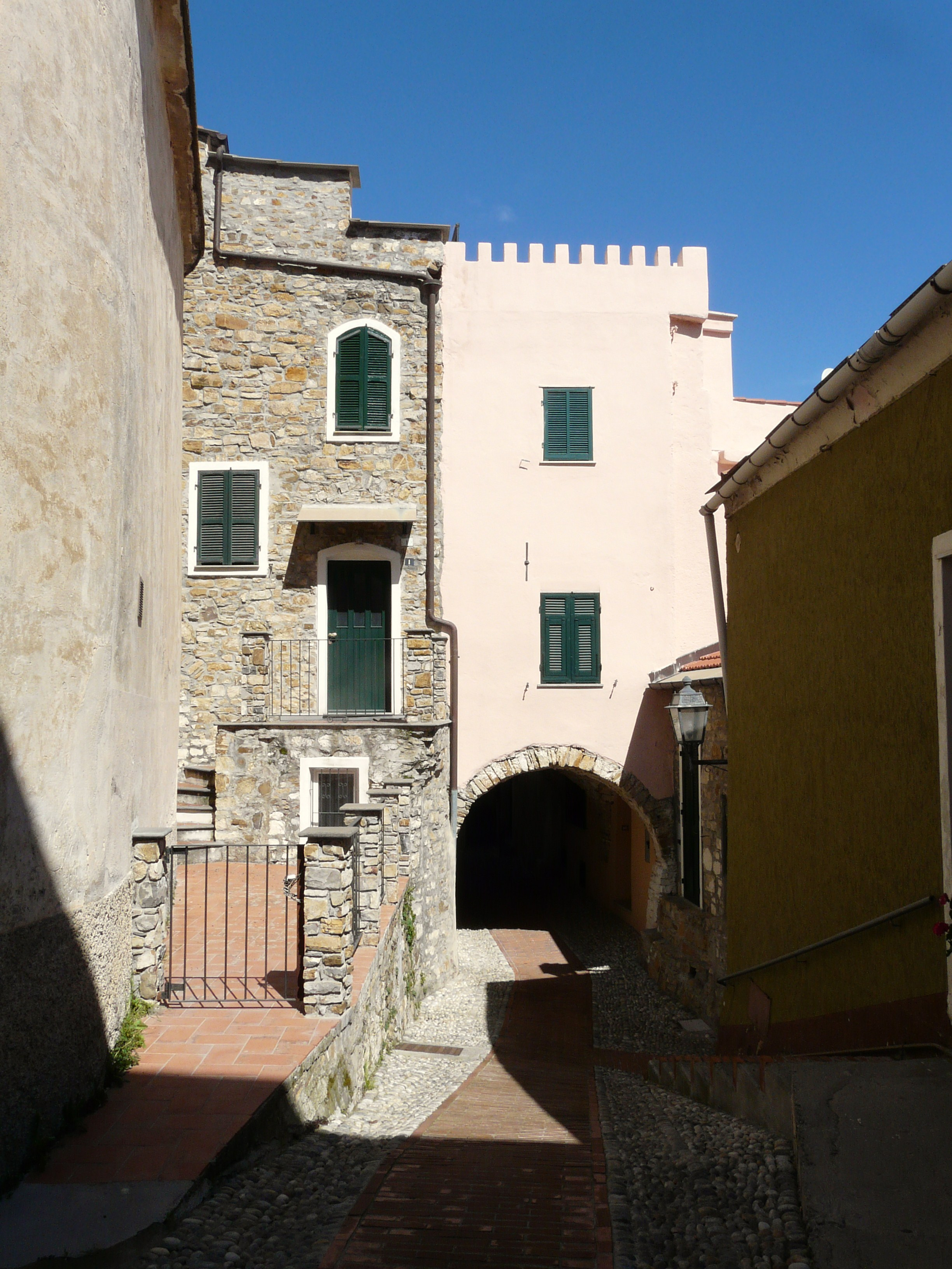 Costarainera, Liguria, Italia